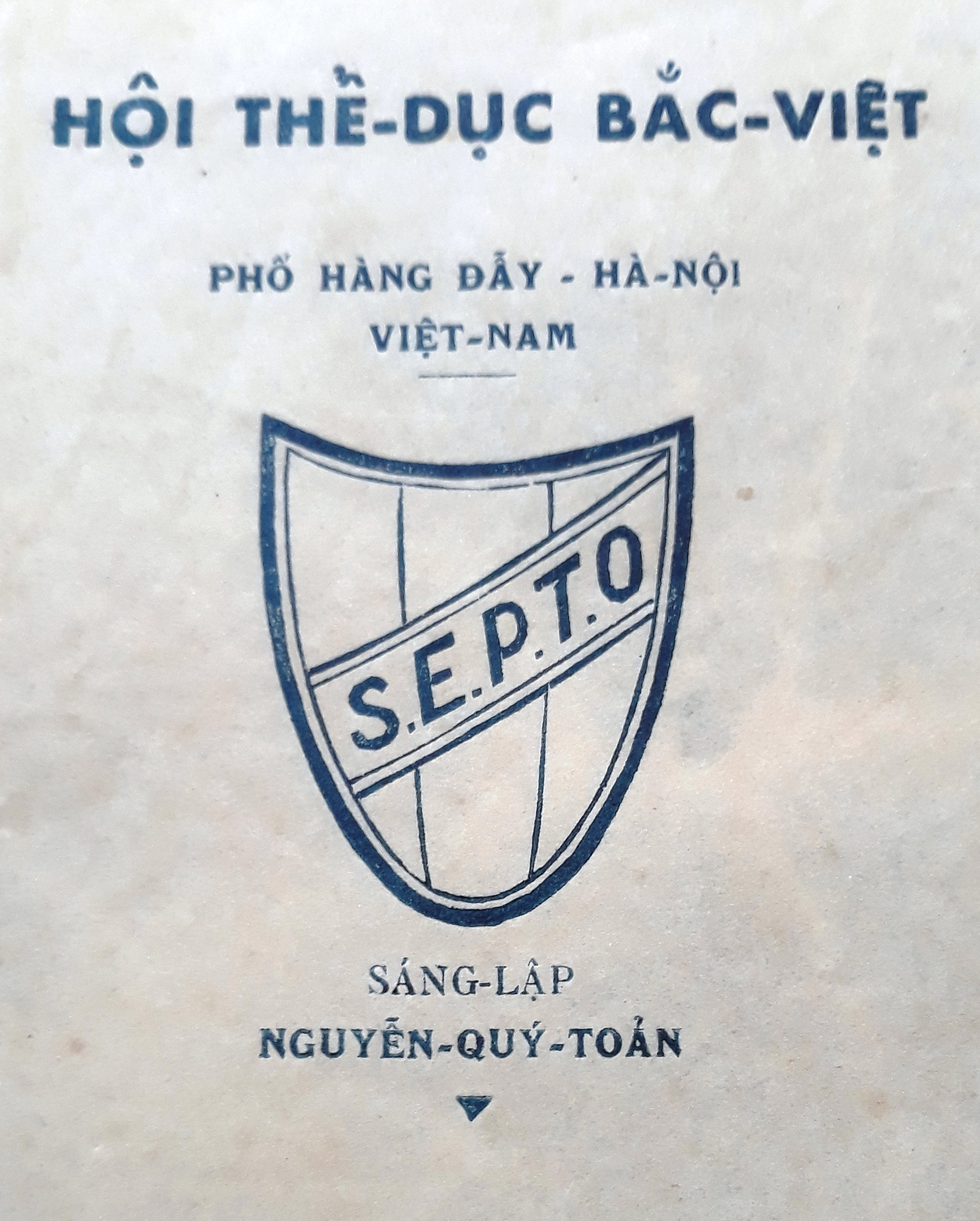 Hàng Đẫy Logo